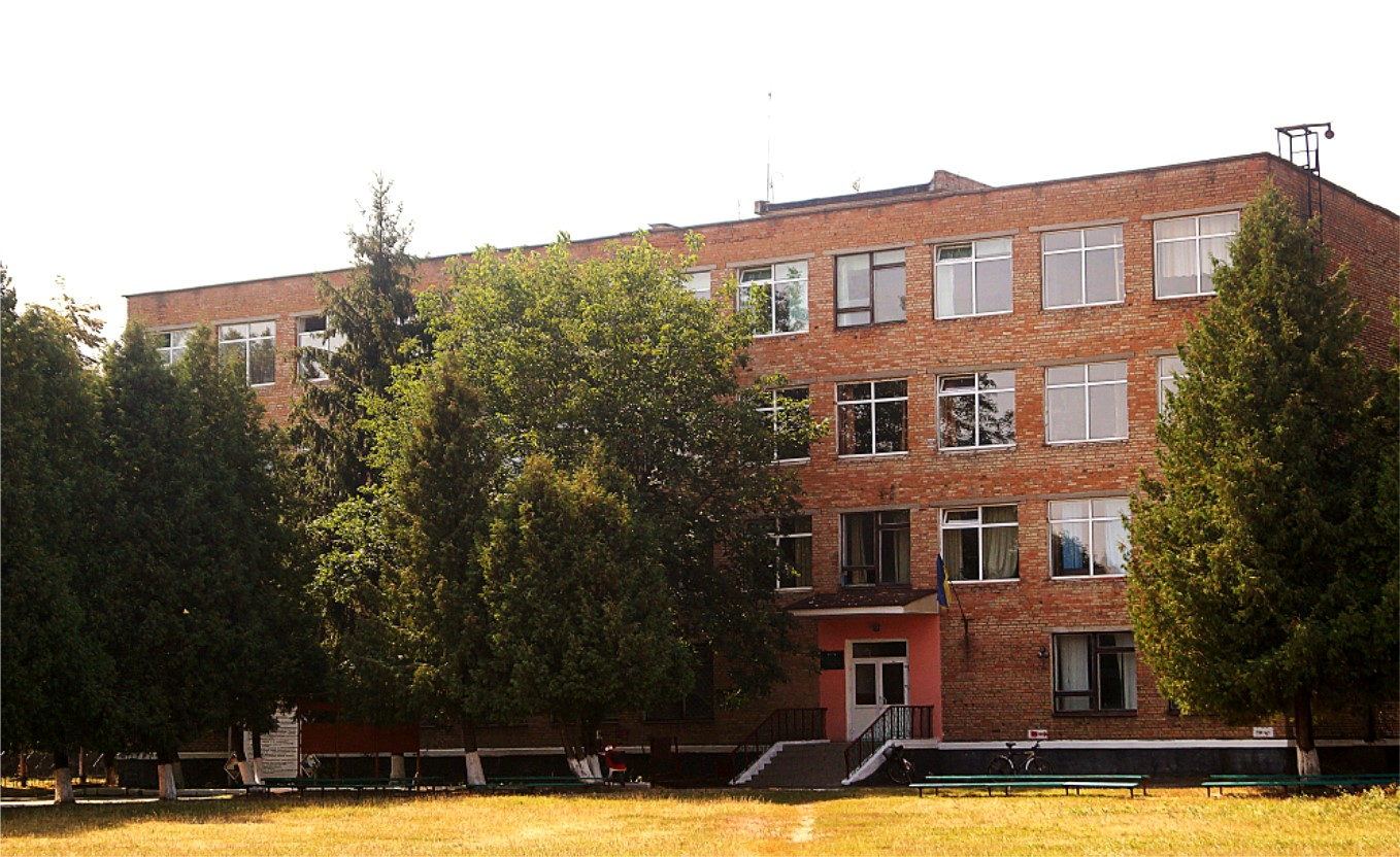 Фасад головного корпусу ПТУ №38, смт. Голованівськ